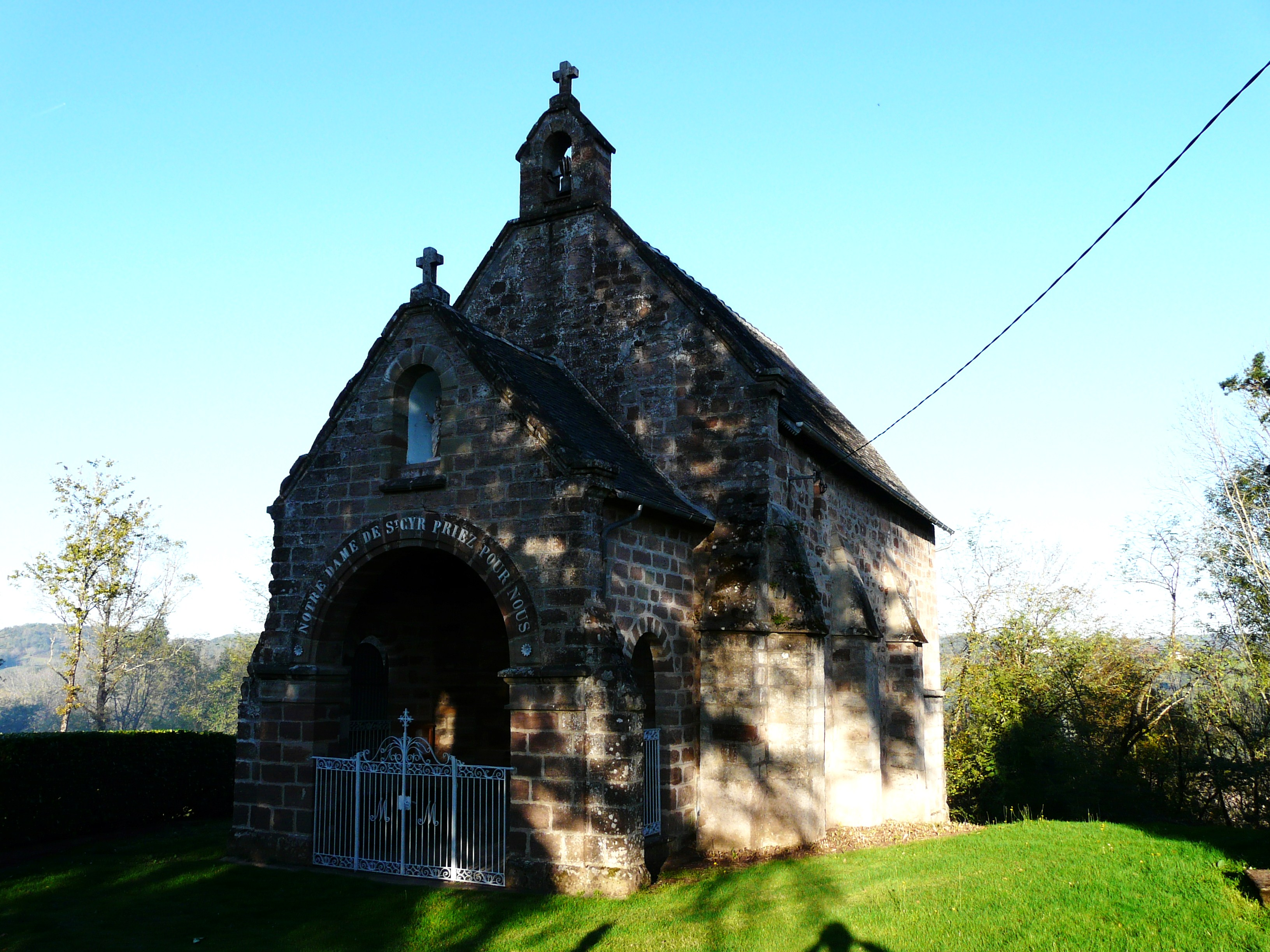 La chapelle Notre-Dame d'Aubepeyres, Saint-Cyr-la-Roche, Corrèze, France